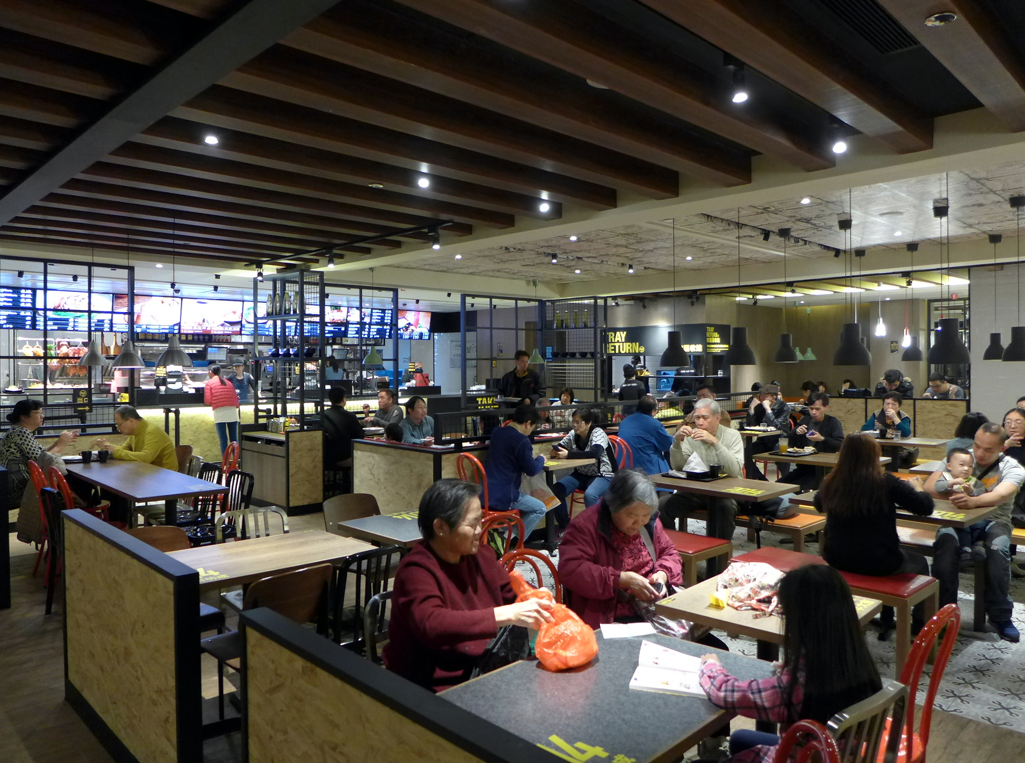 Maxim's MX2 interior in Luk Yeung Galleria